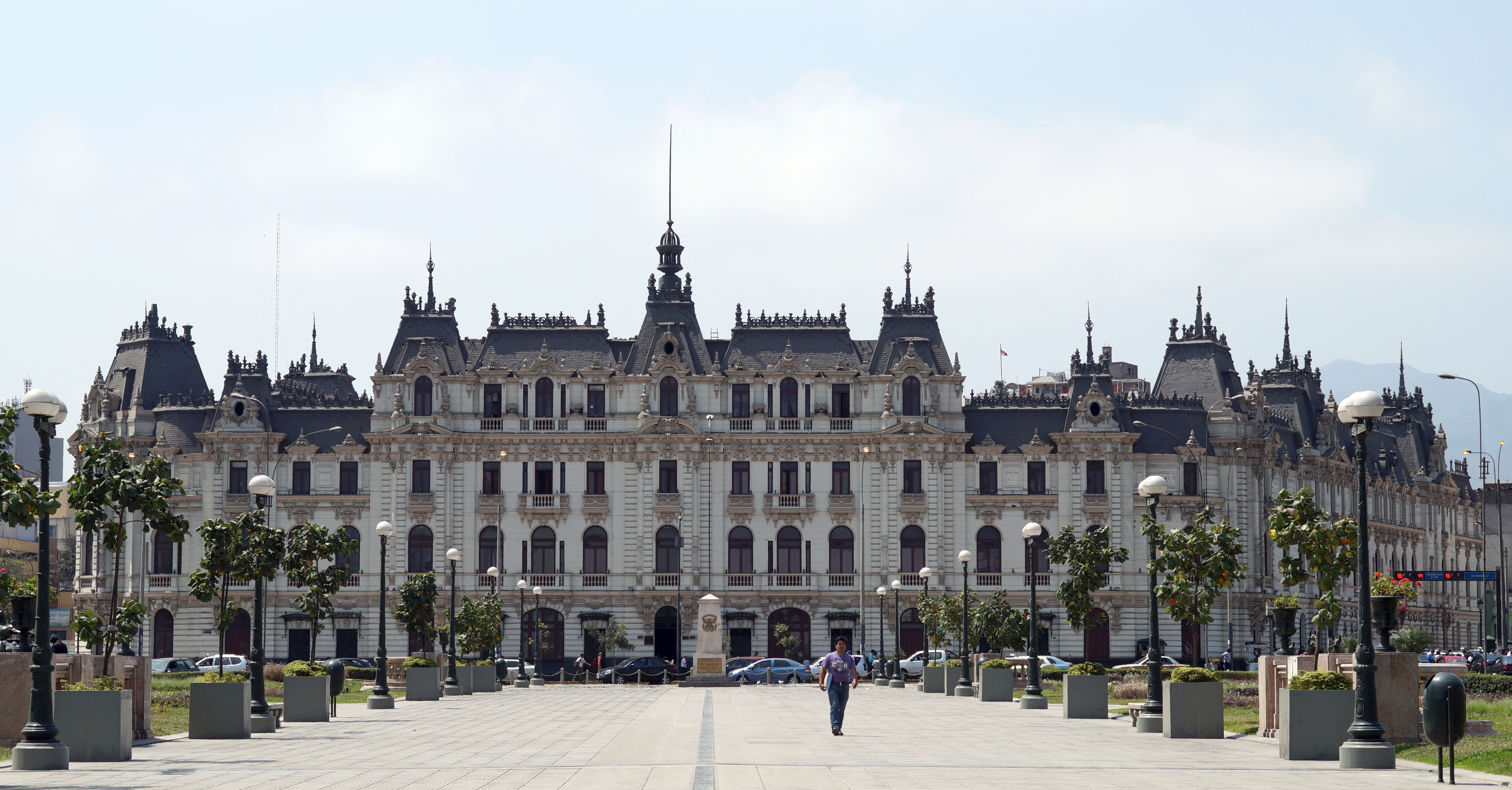 El Edificio Rímac, también conocido como Casa Roosevelt, es un edificio de estilo francés ubicado en el centro de la ciudad de Lima, capital del Perú. Considerado actualmente uno de los principales atractivos de la ciudad. Ubicación: Avenida Roosevelt 101 y 157, esquina con Jirón de la Unión 1177 y 1199. Es el punto de partida de la avenida Paseo de la República. Fuente: Casa Roosevelt o Edificio Rímac Twitter: DiNoBokeh Instagram: artdino_ Sitio web: Perú Generación XXI Facebook: ArtDiNo15